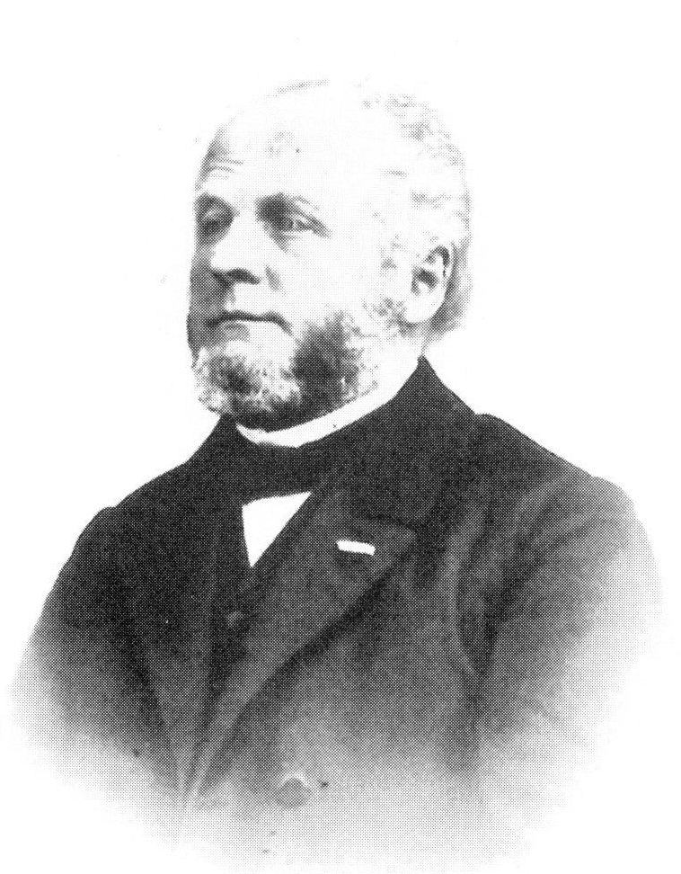 Anton Fürbringer (1810-1880), Landtagspräsident Reuß j. L.